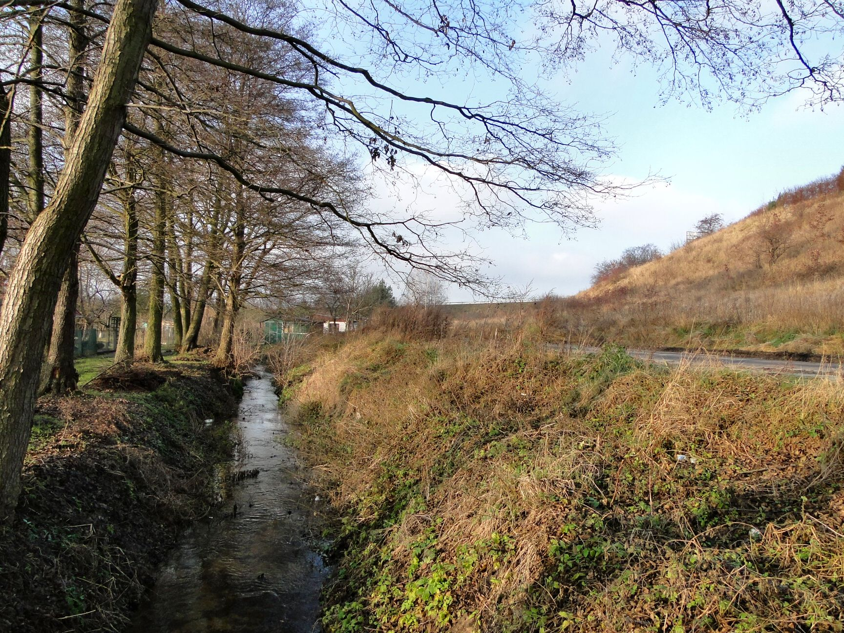 Szczecin Kluczewko - Wełtyński Strumień i biegnąca równolegle ul. Polarna